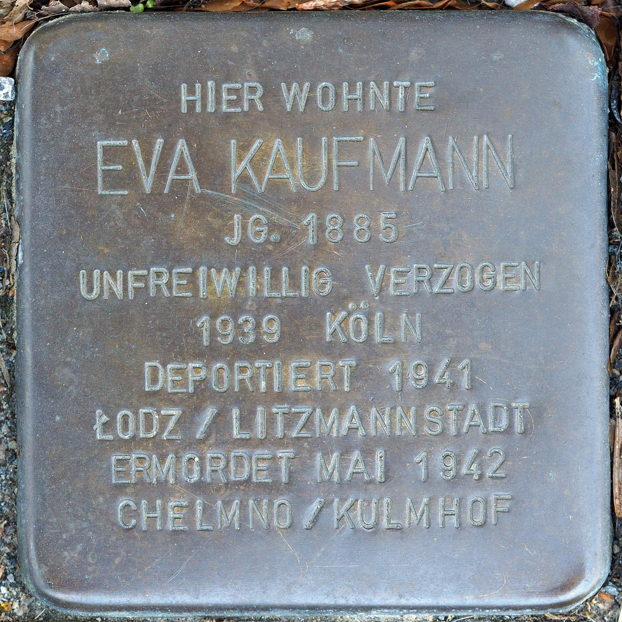 Stolpersteine GV: Kaufmann, Eva